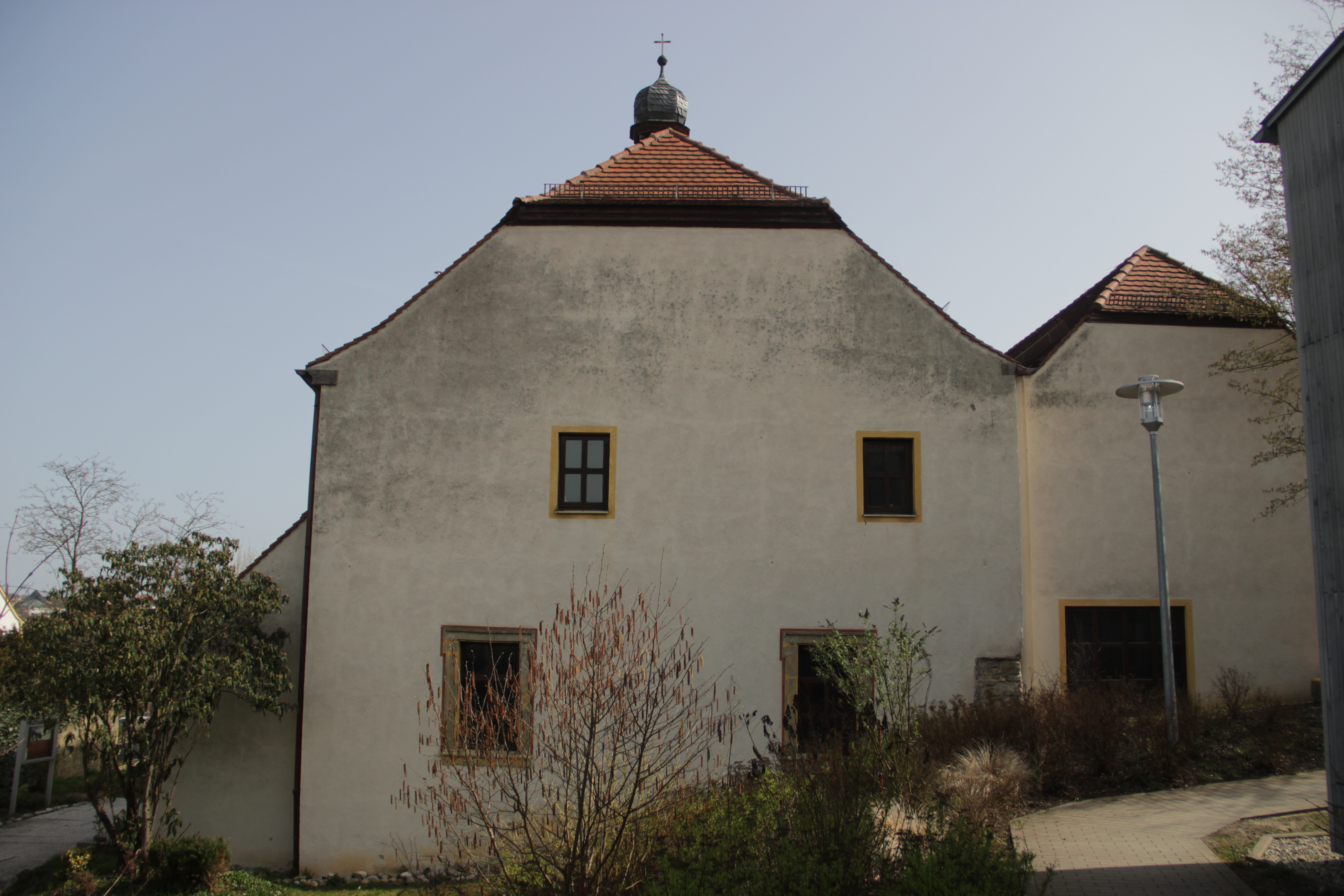 Ehemals Synagoge, seit 1951 evang.-luth. Pfarrkirche Sankt Matthäus, tonnengewölbter Massivbau mit Halbwalmdach, Dachreiter sowie geohrten Fensterrahmungen, 1721, mit Ausstattung